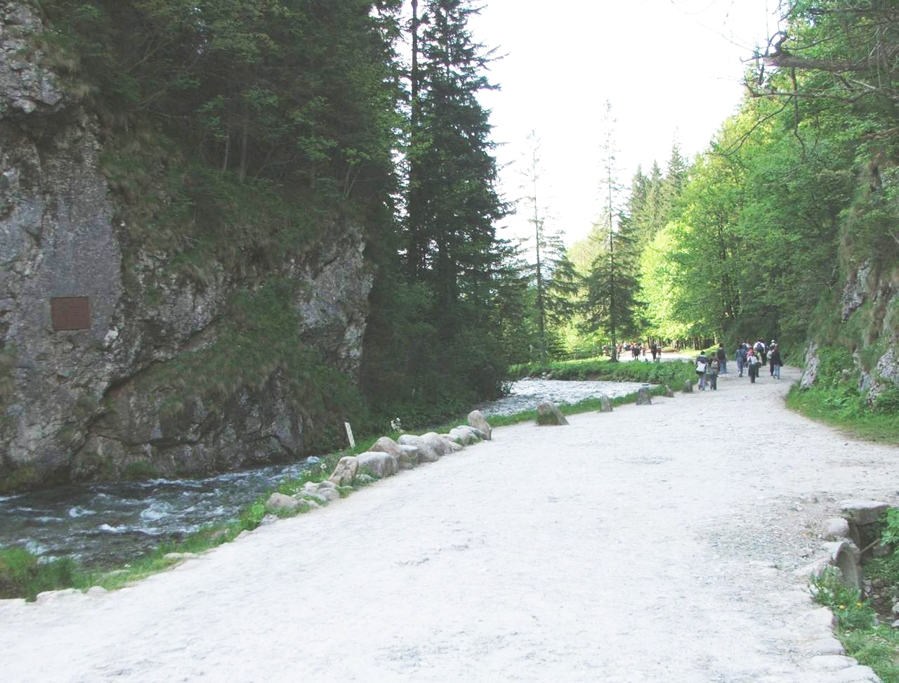 Brama Kantaka (Dolina Kościeliska)